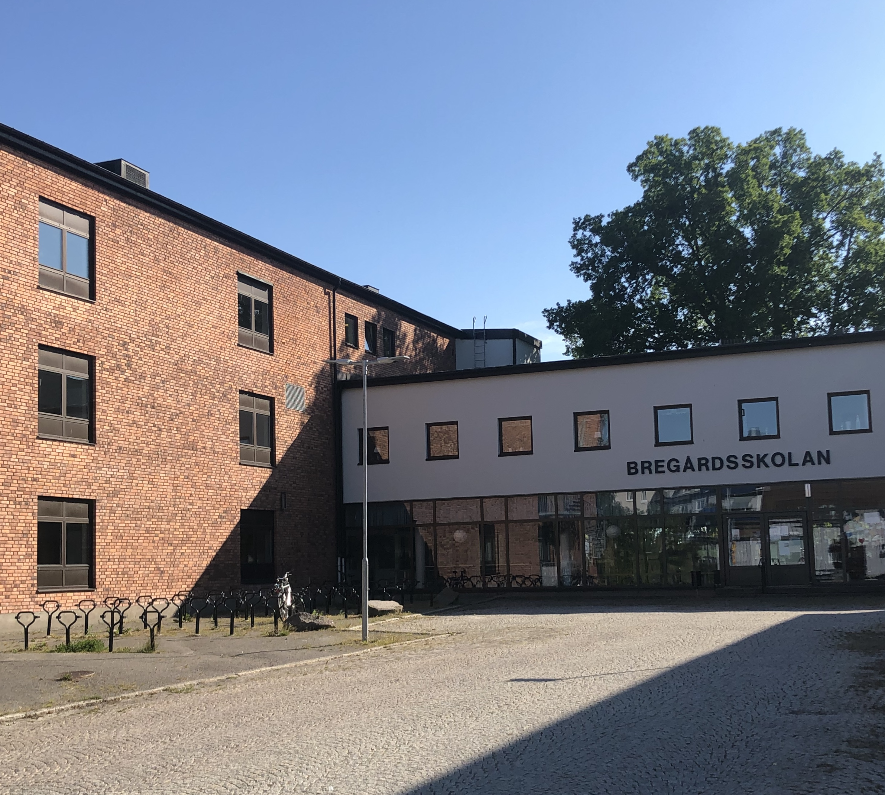 Bregårdsskolan är en kommunal mellan- och högstadieskola